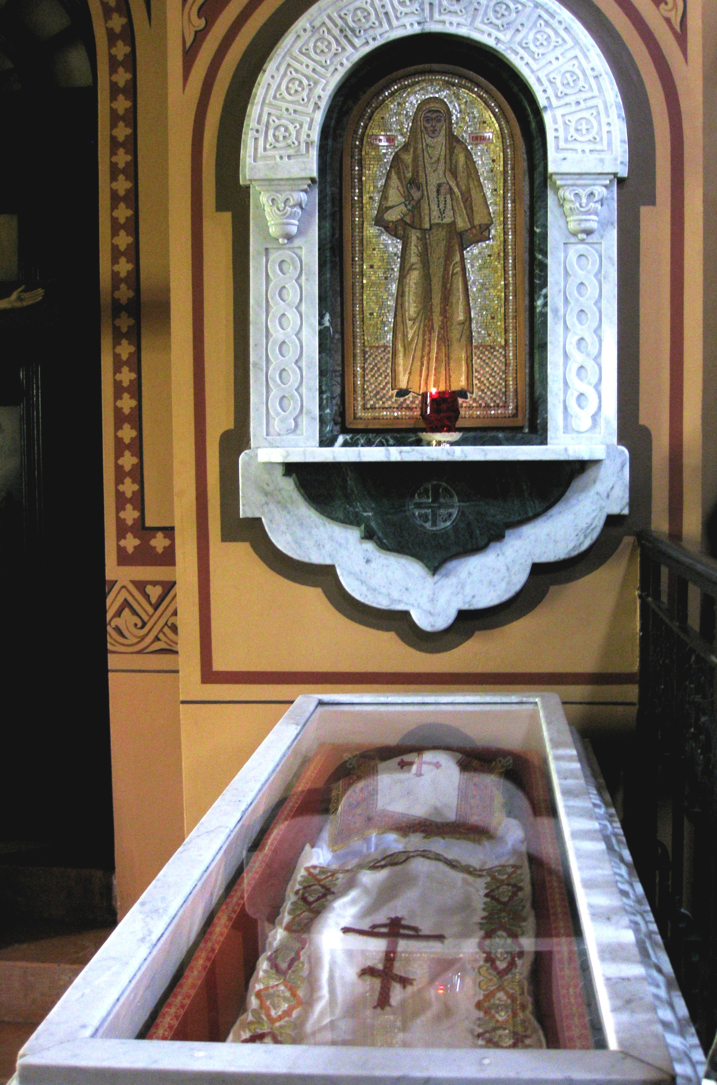 Church of Saint Mary Magdalene כנסיית מריה מגדלנה (כנסיית הבצלים) Tomb of Holy Martyr Varvara Alexeyevna Yakovleva) קבר הנסיכה אליס